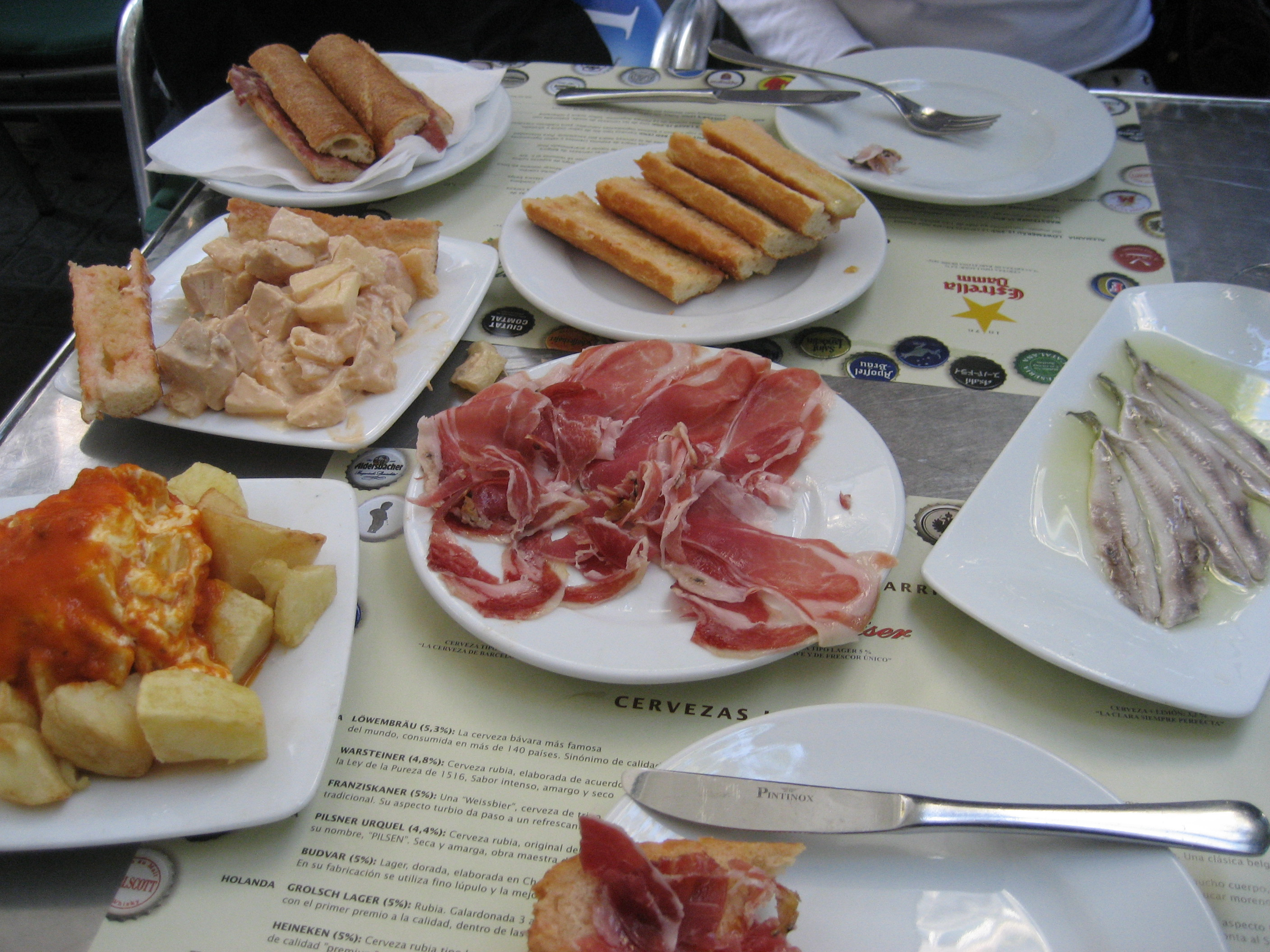 Jamón, Boquerones, Patatas Bravas, Pà amb tomàquec